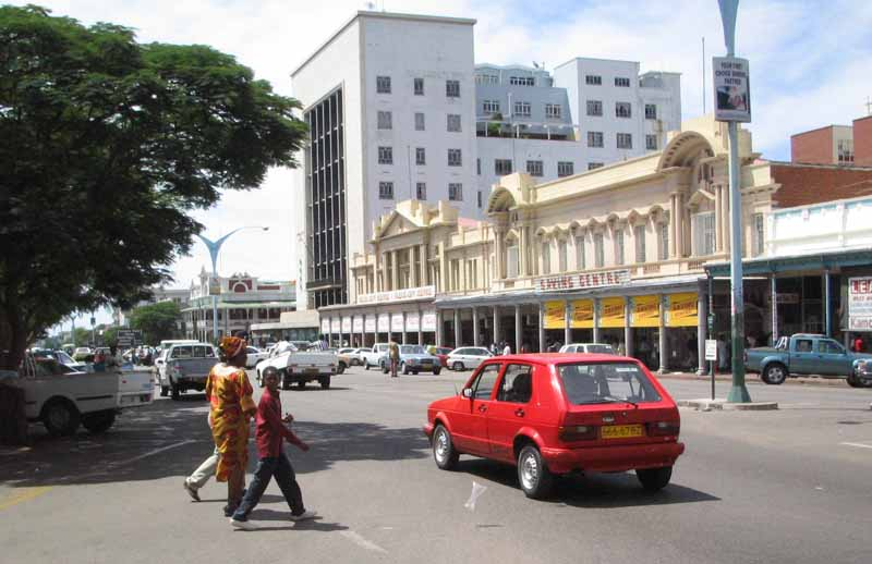 Улица у Булавају, снимљено 22. марта 2005, Аутор Радован Корда